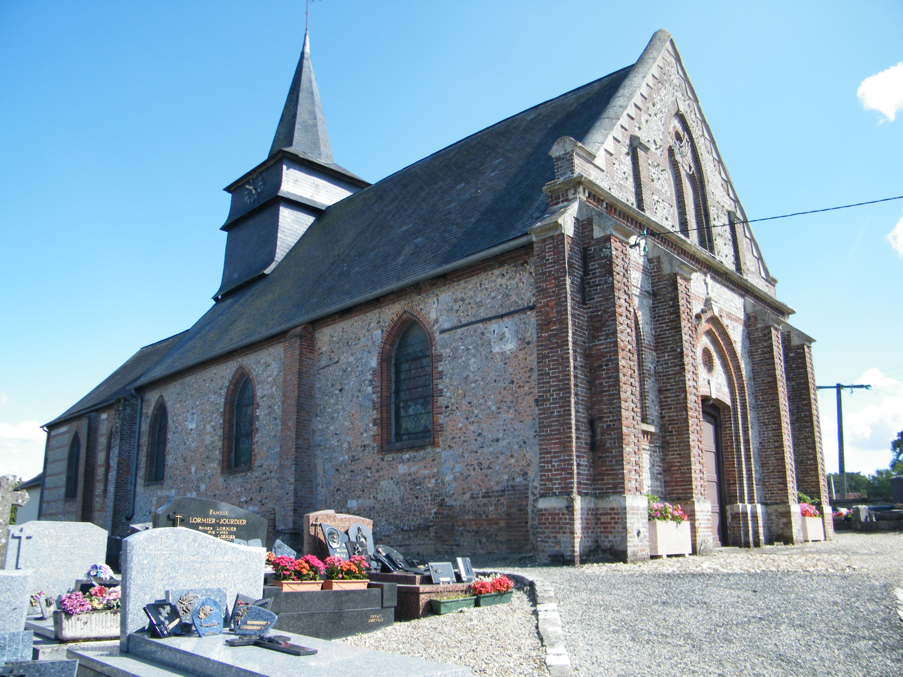 Dancourt, Seine-Maritime, France, église